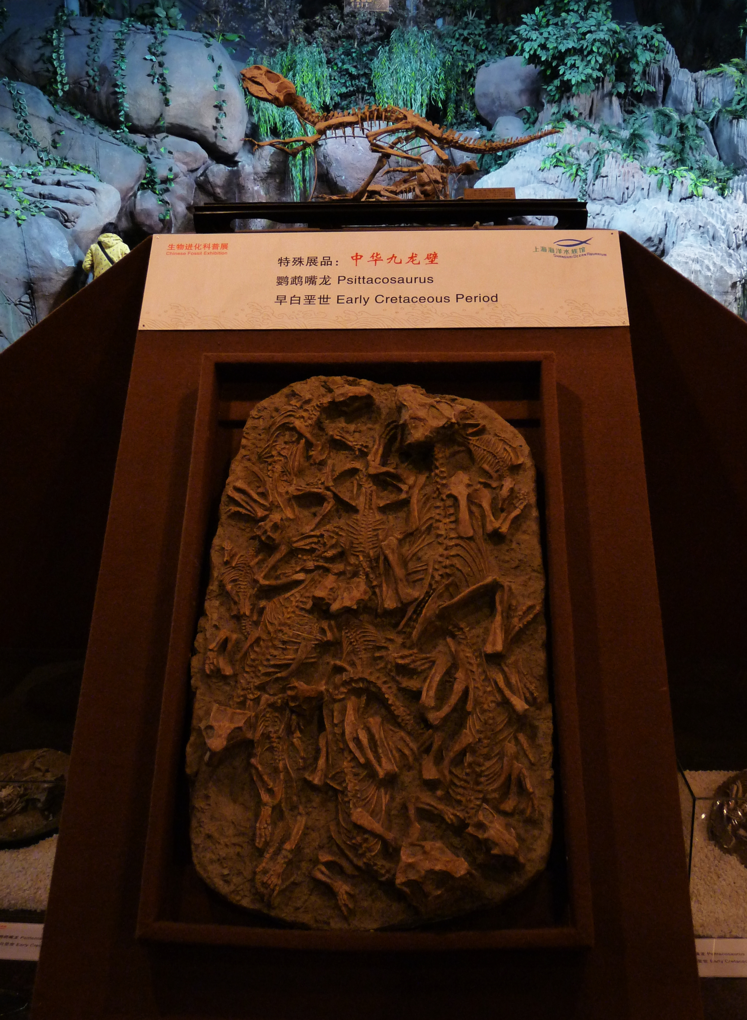 Psittacosaurus